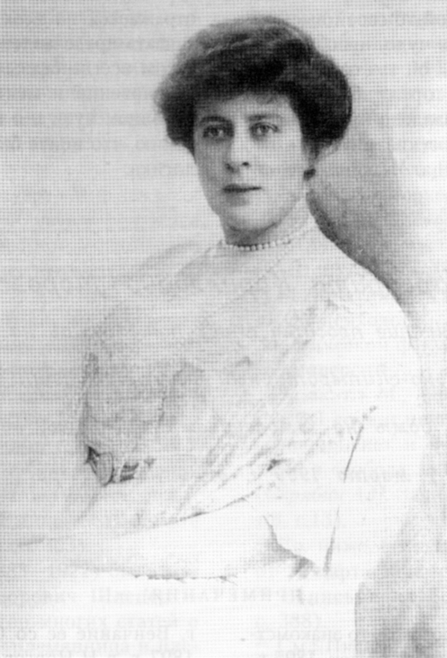 Морозова Маргарита Кирилловна